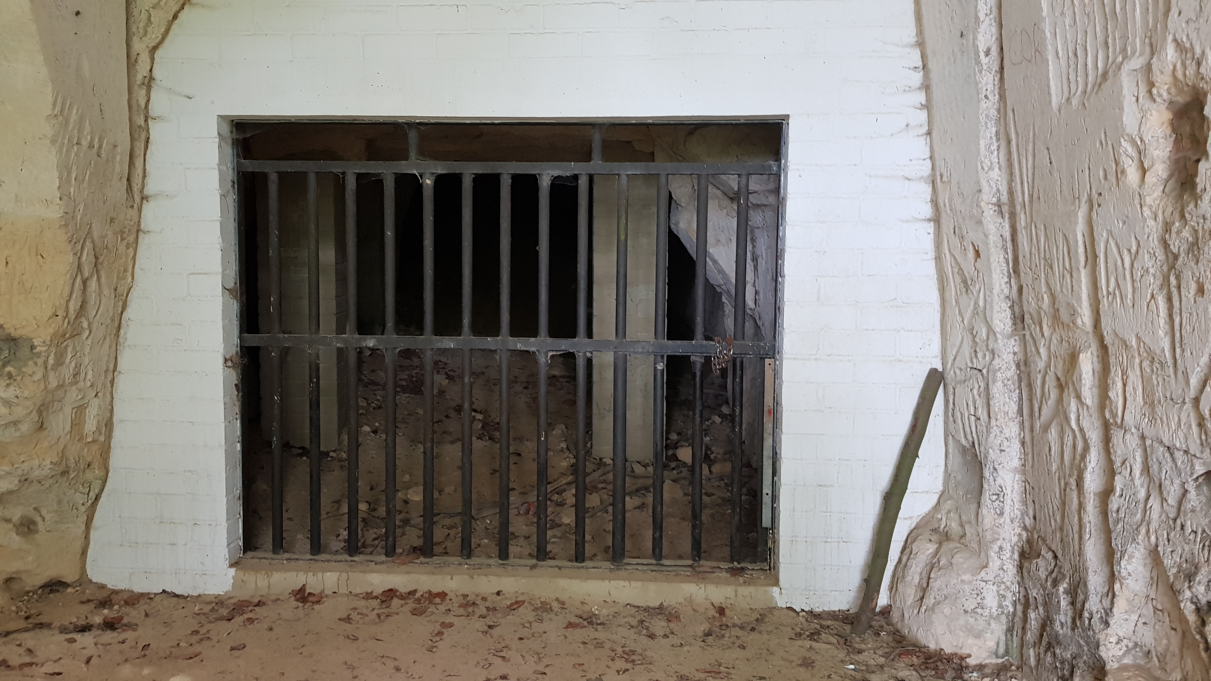 Heerderberggroeve, Cadier en Keer, Nederland